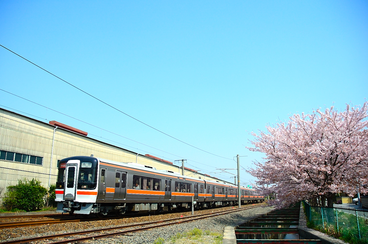 快速みえ号